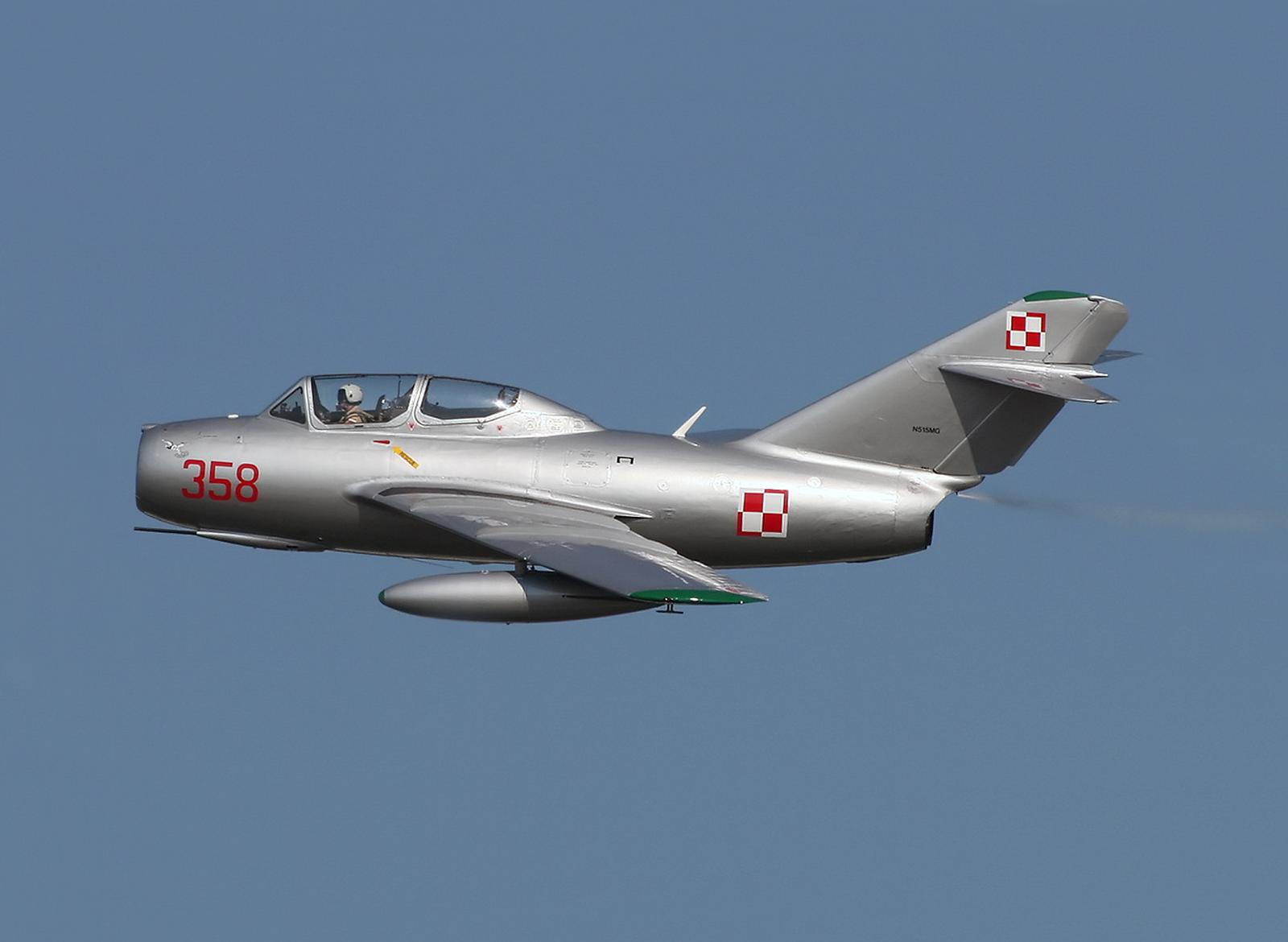 (AirVenture 2006)